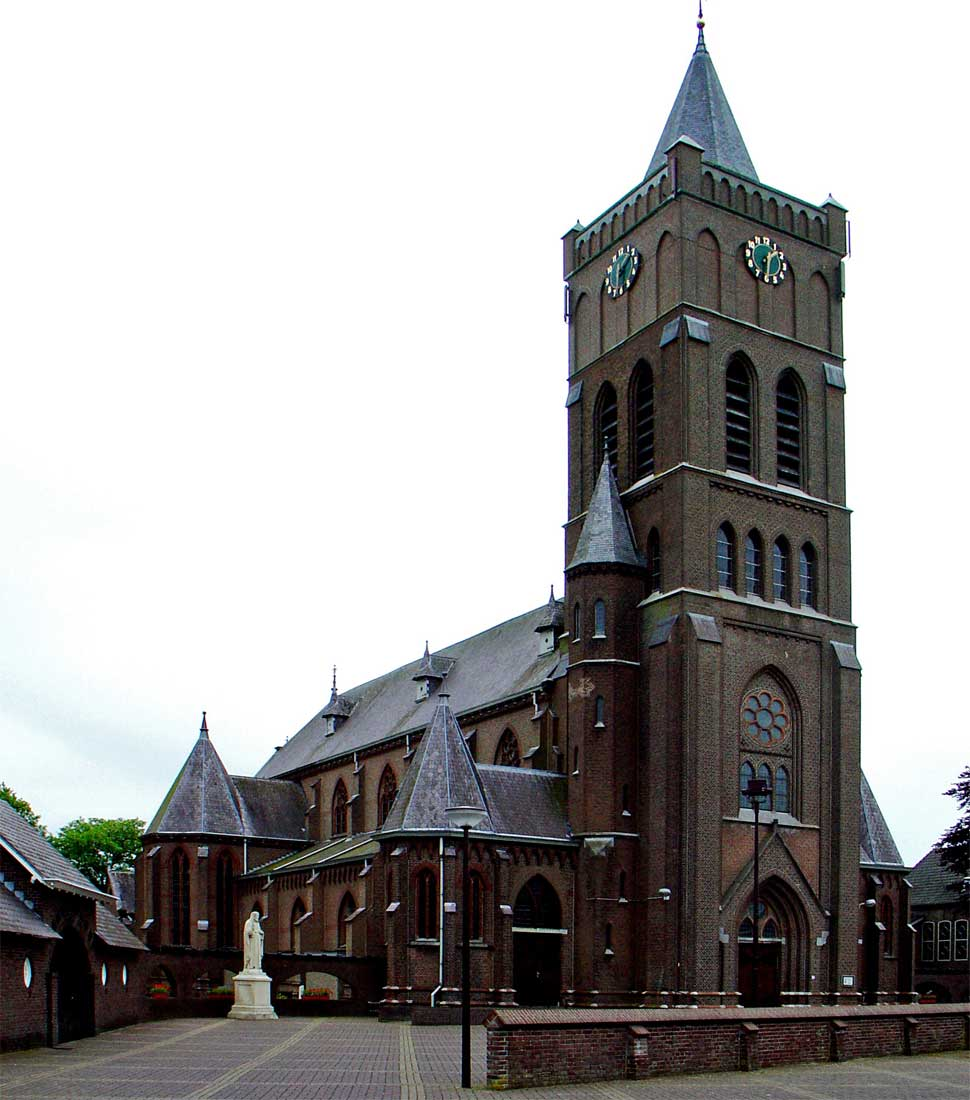 Kerk van H. Antonius Abt te Schaijk (Church Schaijk:)